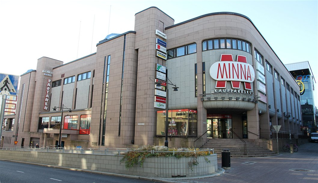 Kauppakeskus Minna on kauppakeskus Kuopion keskustassa. Sen osoite on Haapaniemenkatu 18; kauppakeskuksen naapureina ovat H-talo ja kauppakeskus IsoCee.